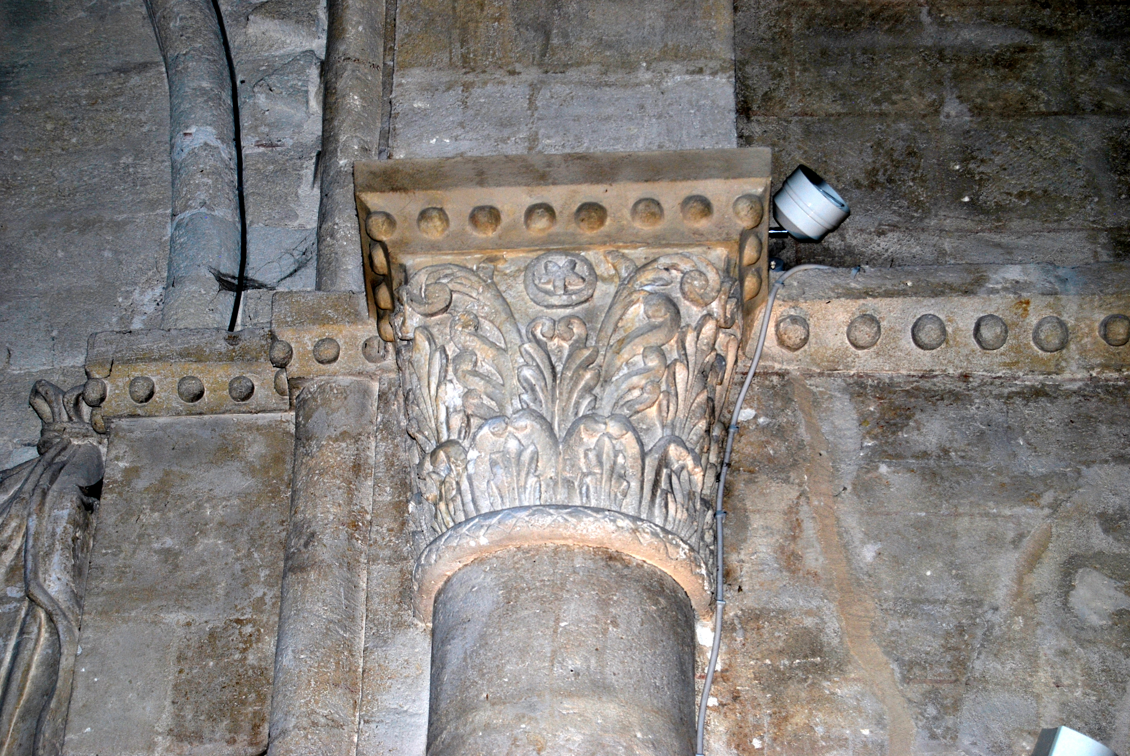 Lignan église Ste Eulalie